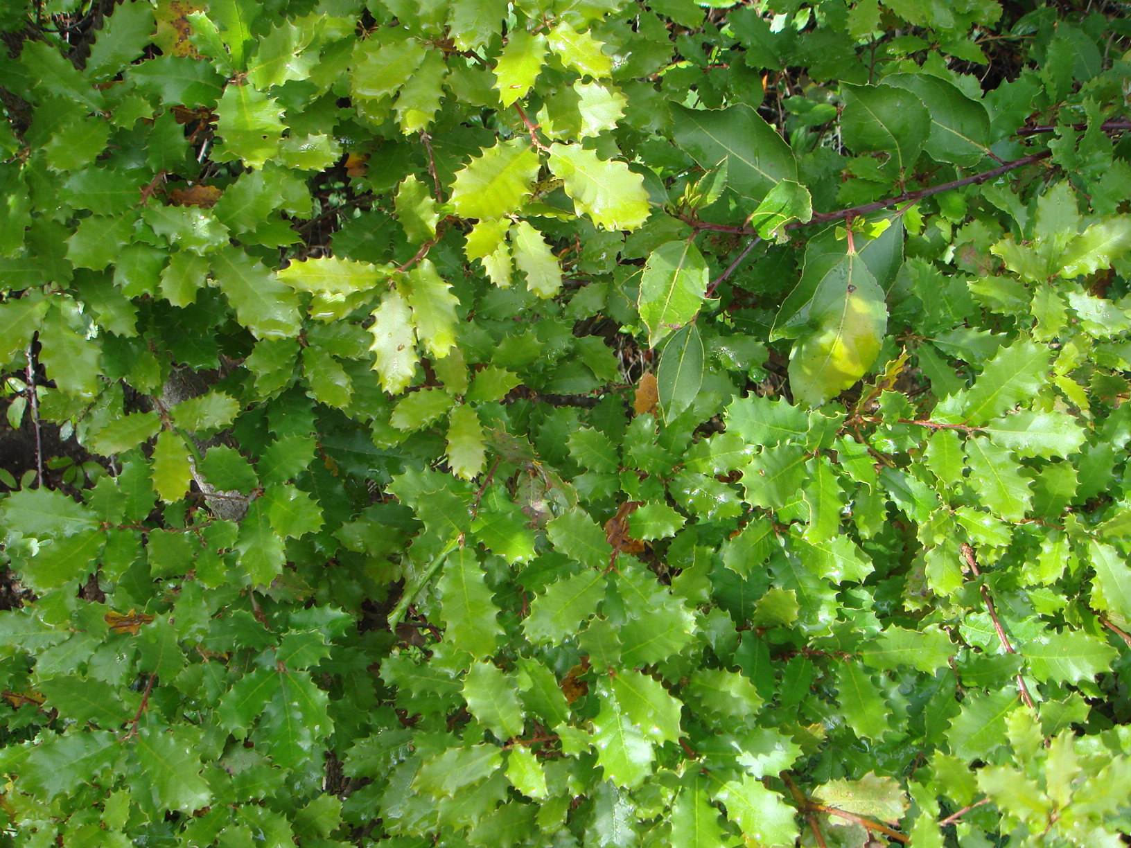 Quercus faginea, El Bosque, Cádiz, España